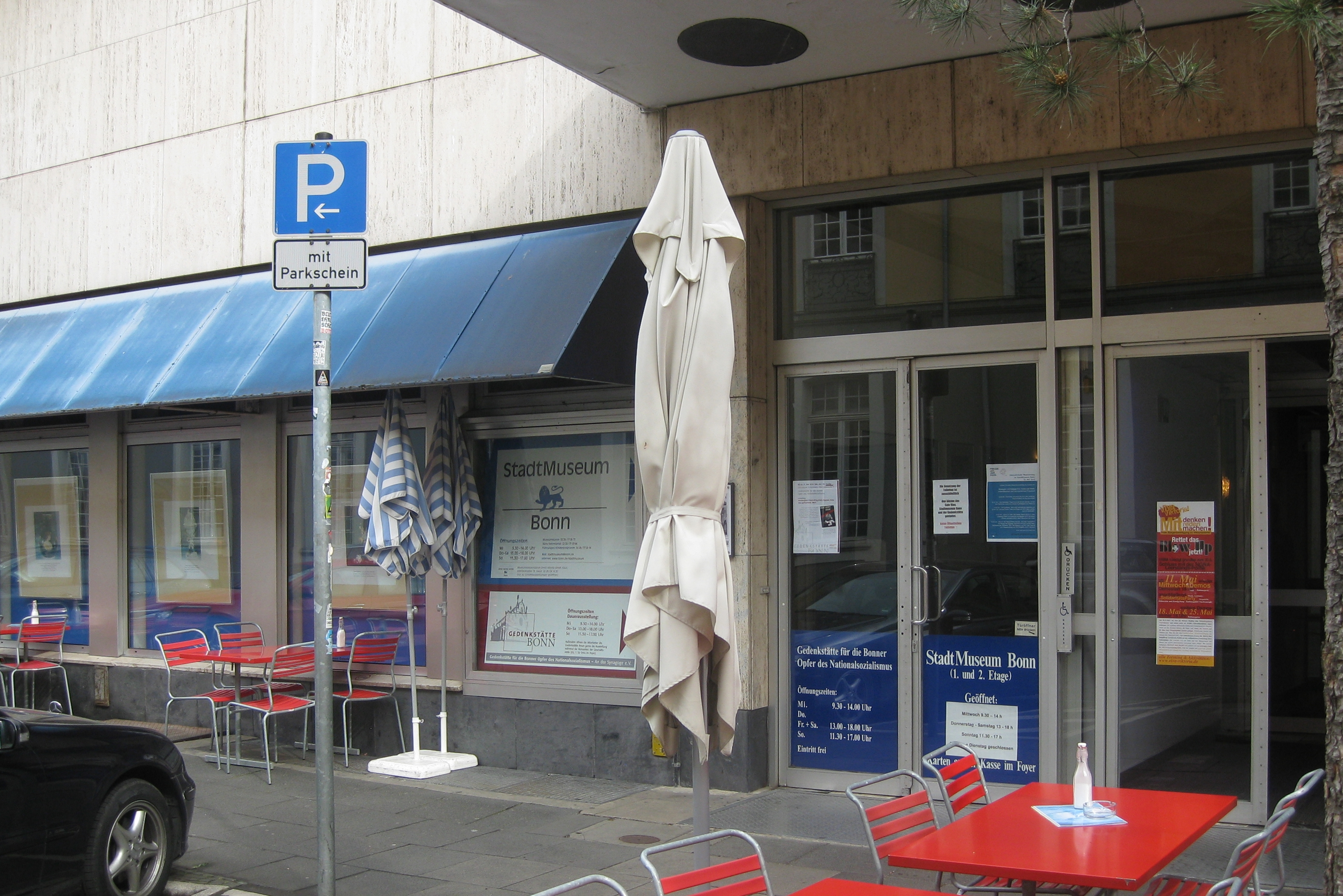 Bonn-Zentrum; Franziskanerstraße 9: Eingang Stadtmuseum Bonn